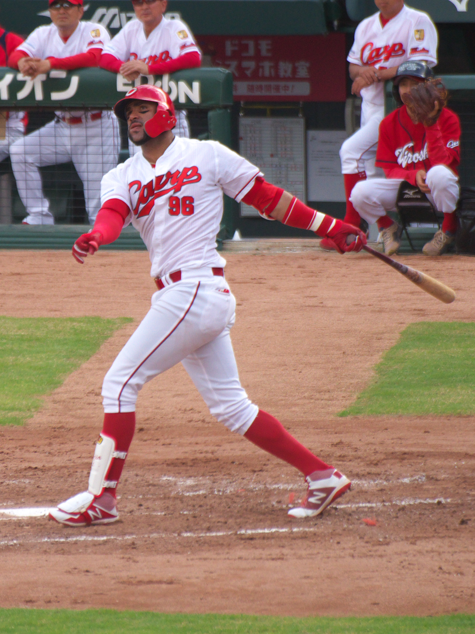 2018年10月7日 アレハンドロ・メヒア マツダスタジアムにて 投稿者による撮影